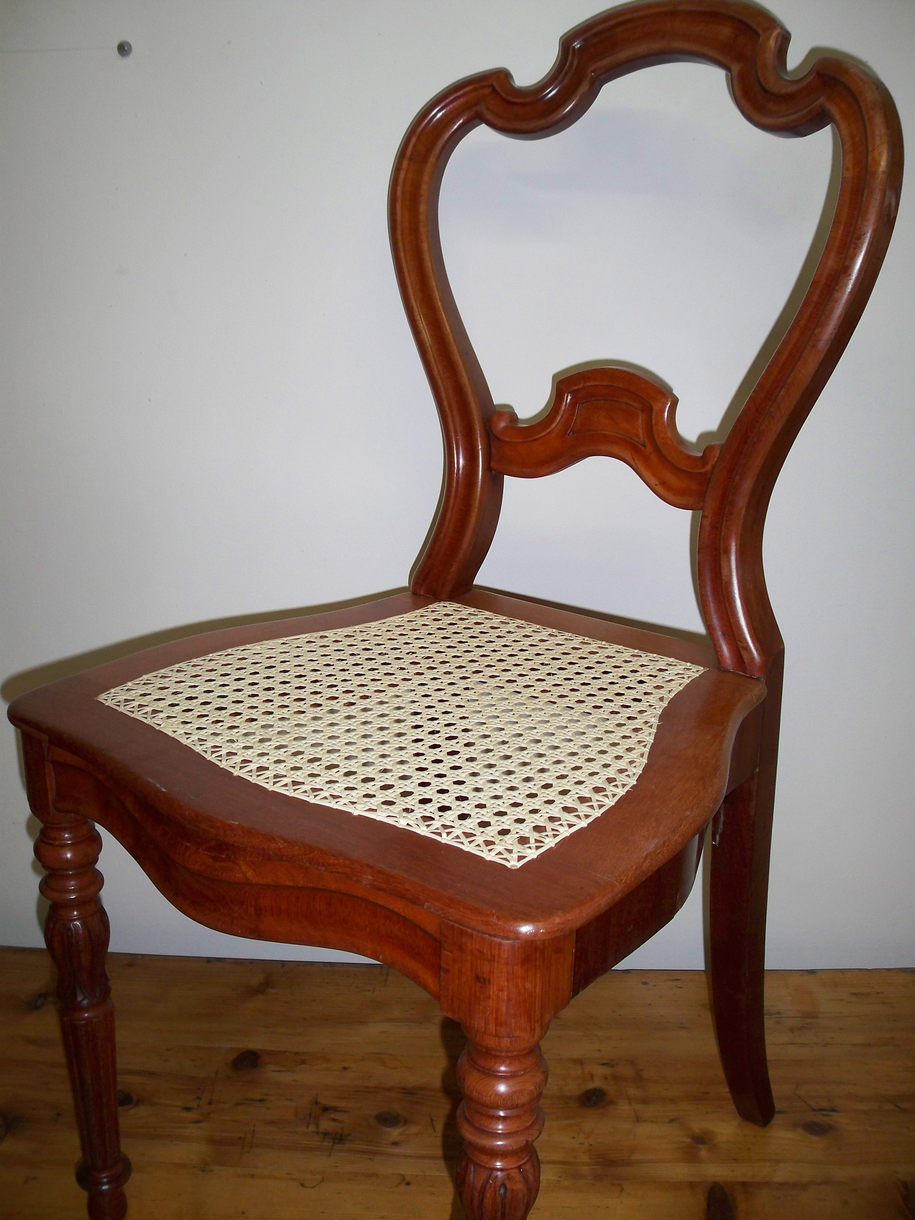 plecionka z ratanu